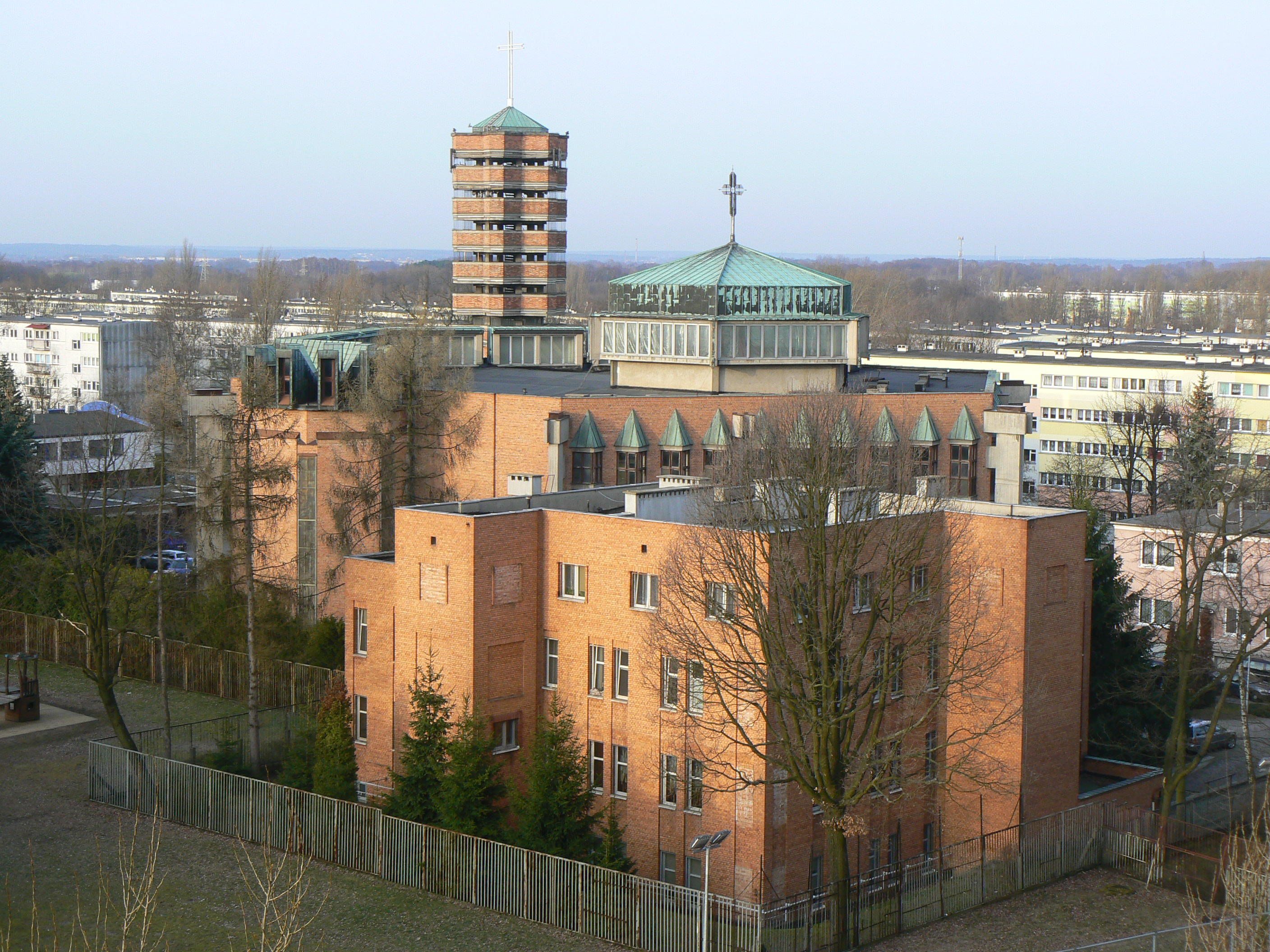 Kościół parafialny parafii pod wezwaniem Matki Boskiej Bolesnej w Łodzi (kościół ojców Pasjonistów) na Teofilowie.